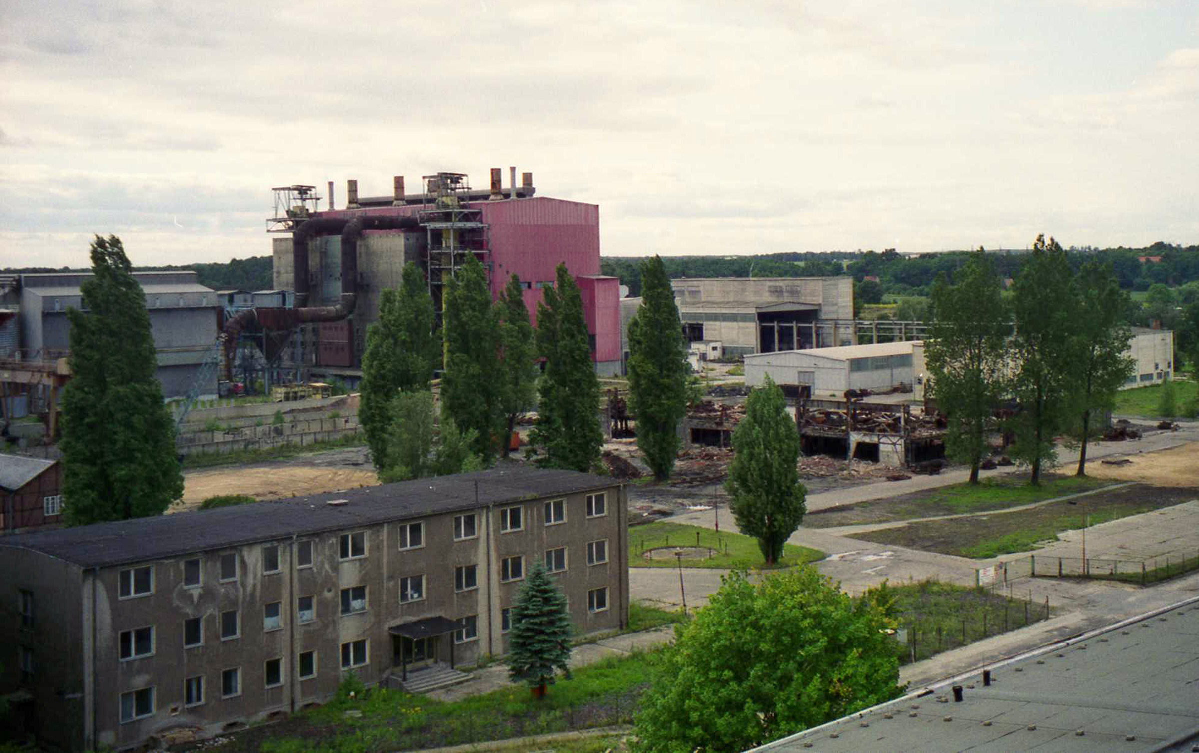 Betriebsgelände Lonza Werk/ Ferrolegierungswerk Trattendorf